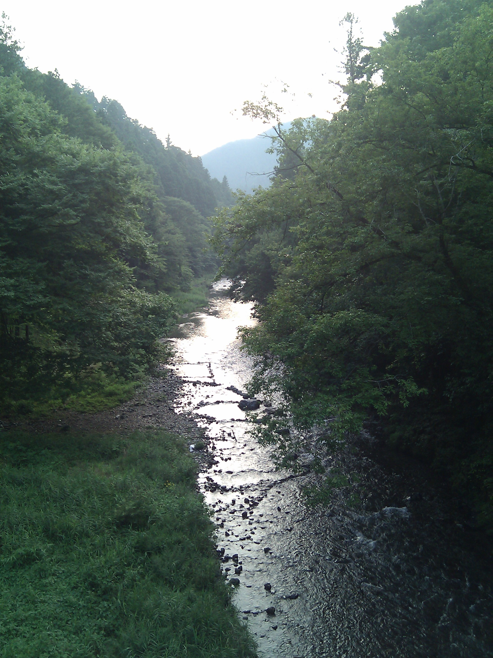 秋川。あきる野市戸倉の石舟橋より上流方向を見る。